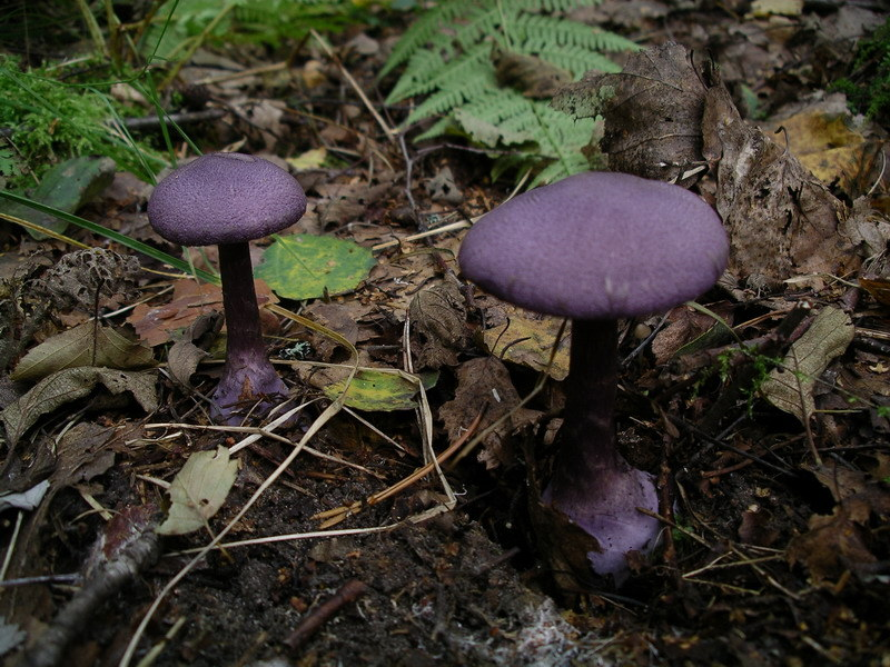 Violetinis nuosėdis (Cortinarius violaceus)